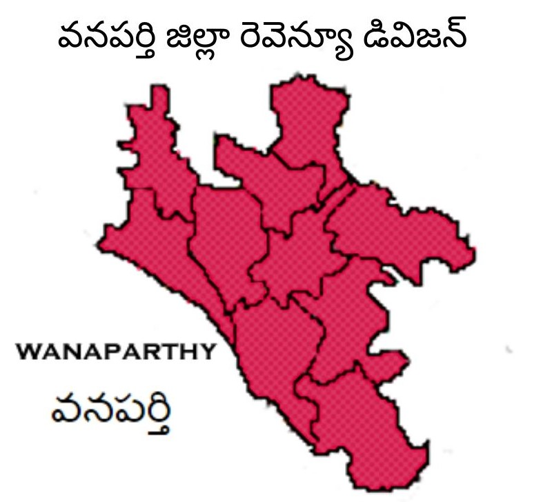 వనపర్తి రెవెన్యూ డివిజన్ చిత్రం